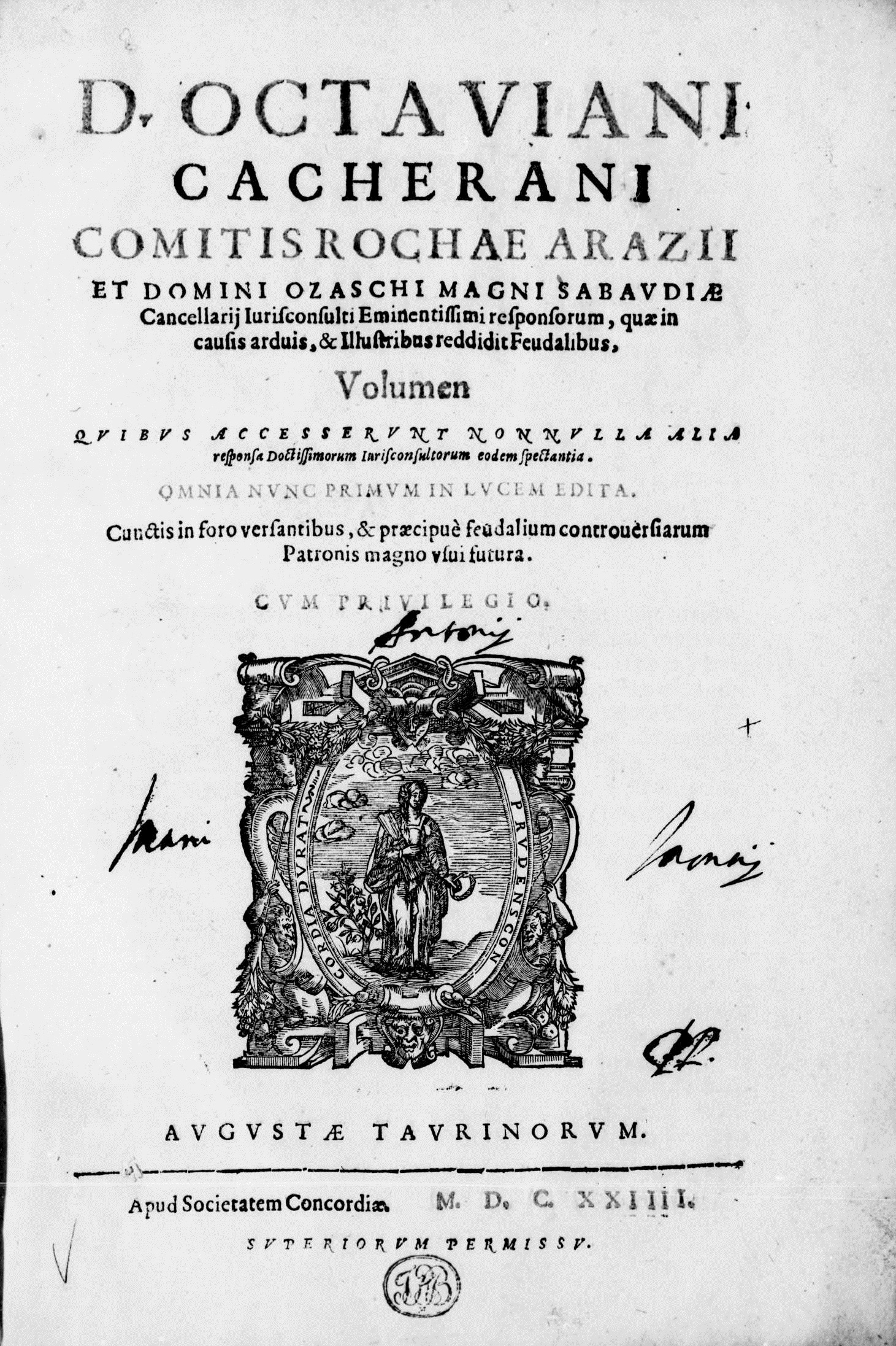 Frontespizio